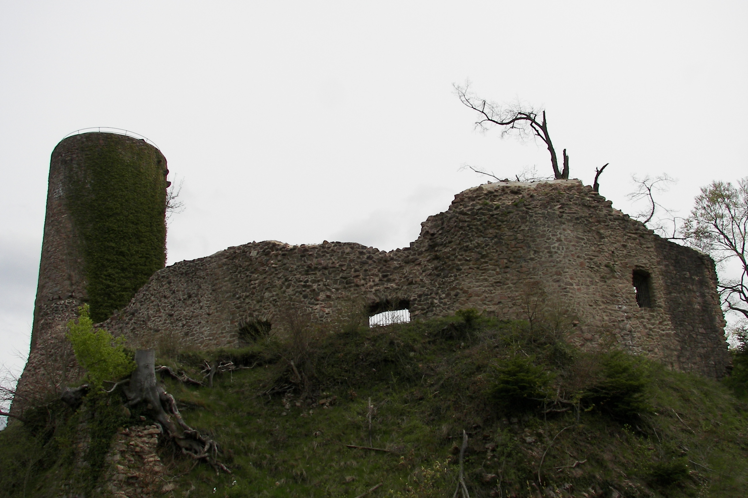 Sausenburg Castle in Baden-Wurttemburg, Germany.